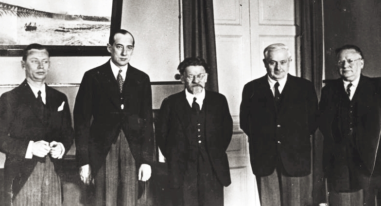 Wizyta Józefa Becka w Moskwie w 1934 r. Od prawej: Litwinow, Jenukidze, Kalinin, Beck, Łukasiewicz.